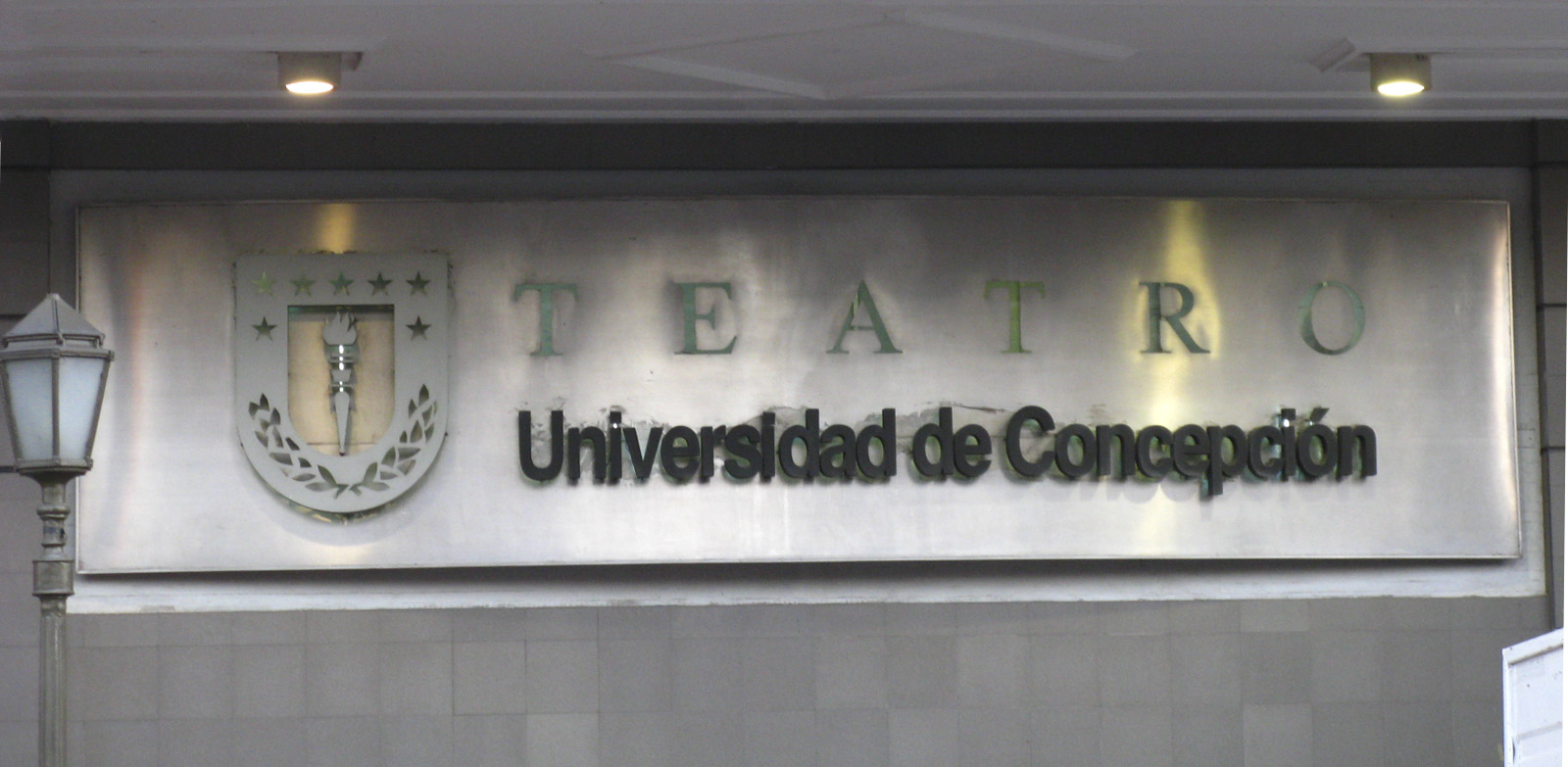 Teatro Universidad de Concepción Concepción, Chile Julio de 2012